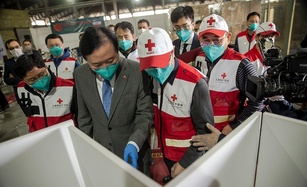 کمک‌های بشر دوستانه کشور چین به ایران